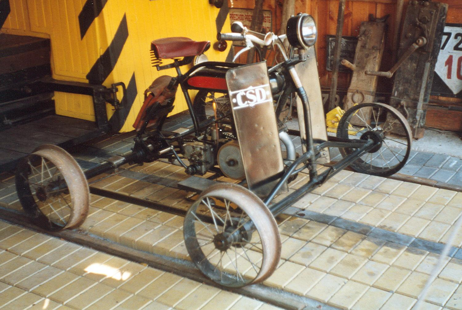 Eisenbahnmuseum Zubrnice: der Star der Ausstellung - die motorisierte Fahrraddraisine Šlégr.